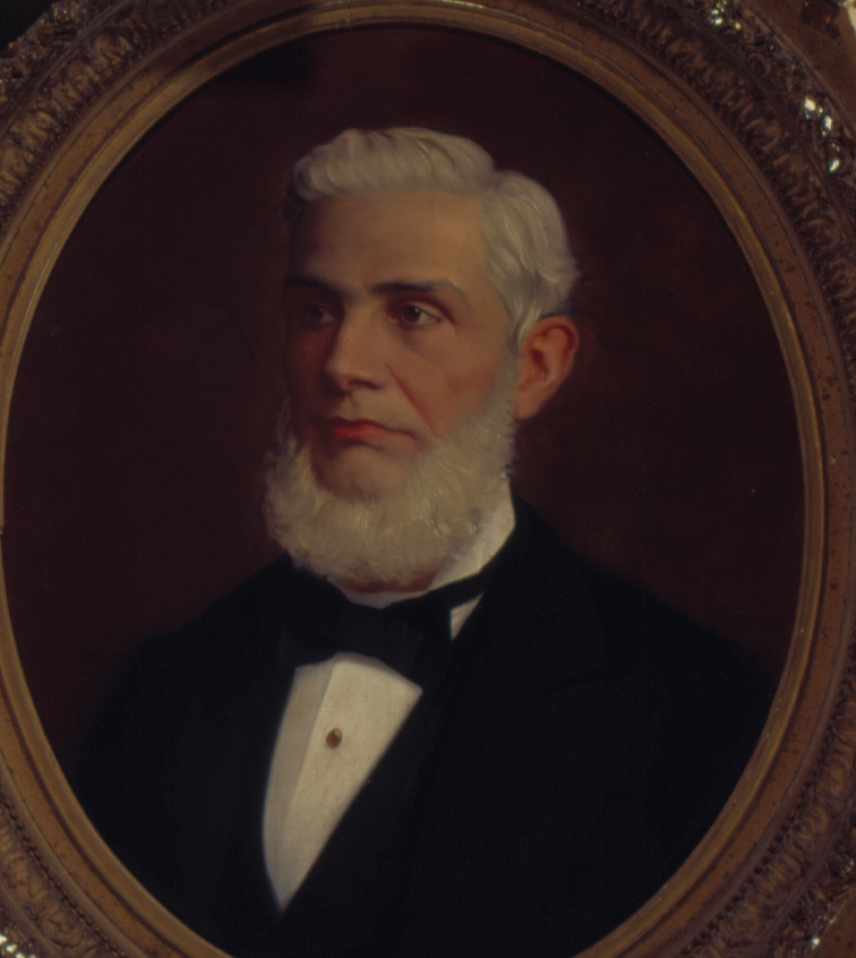 Obra que integra o acervo do Museu Paulista da USP.